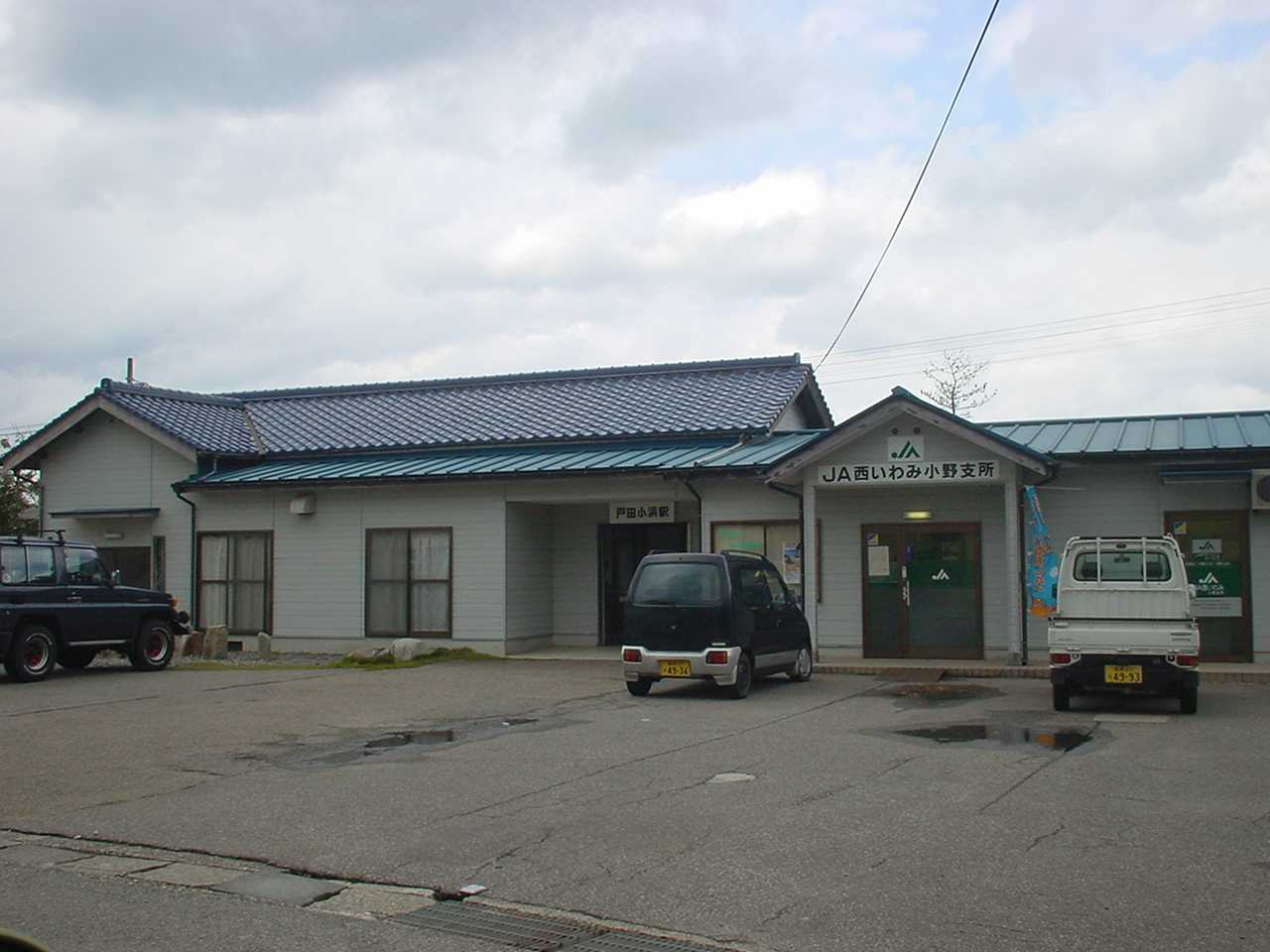 戸田小浜駅（2005年10月22日投稿者が撮影）